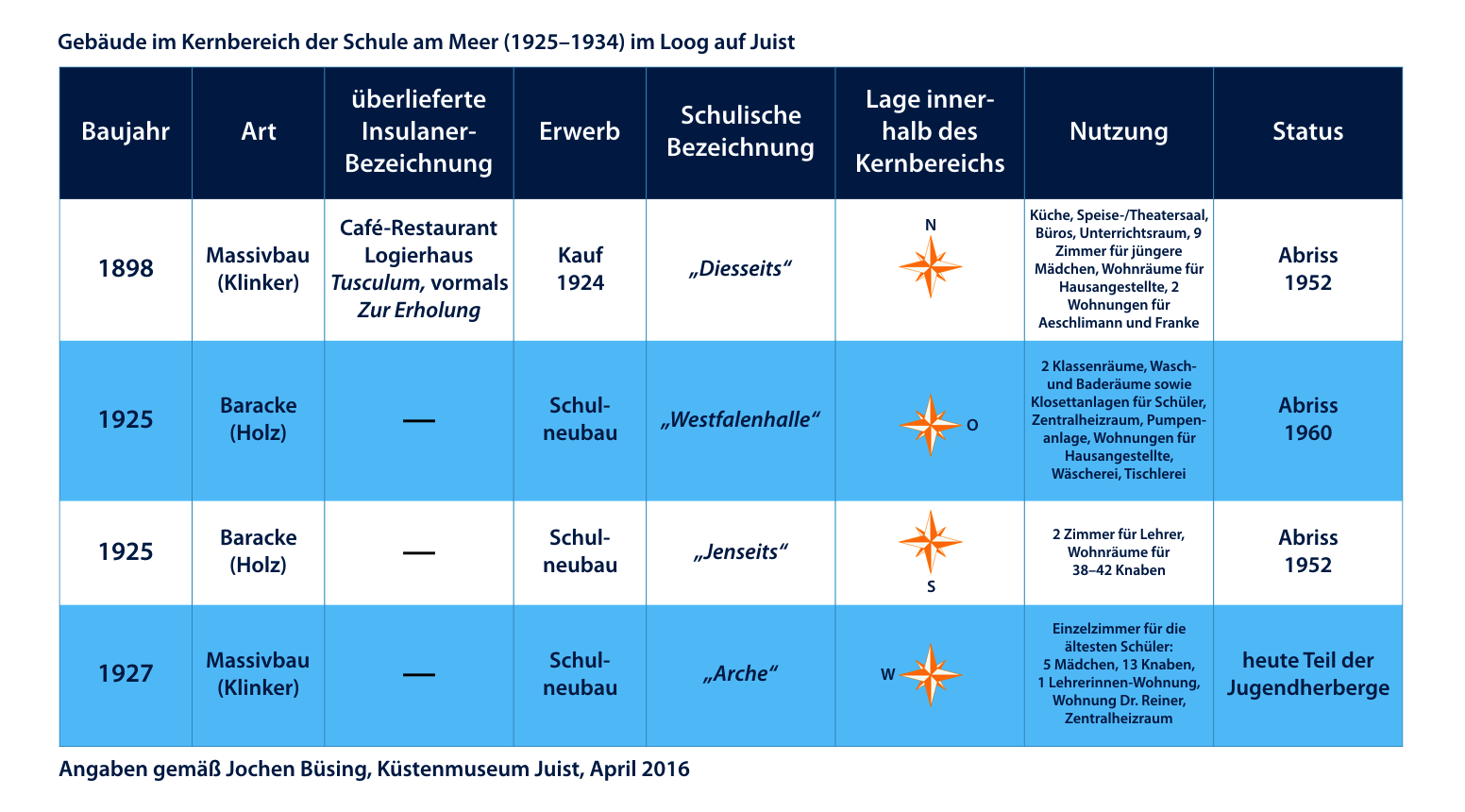 Kernbereich der reformpädagogischen Schule am Meer (1925–1934) von Martin Luserke auf der Nordseeinsel Juist.